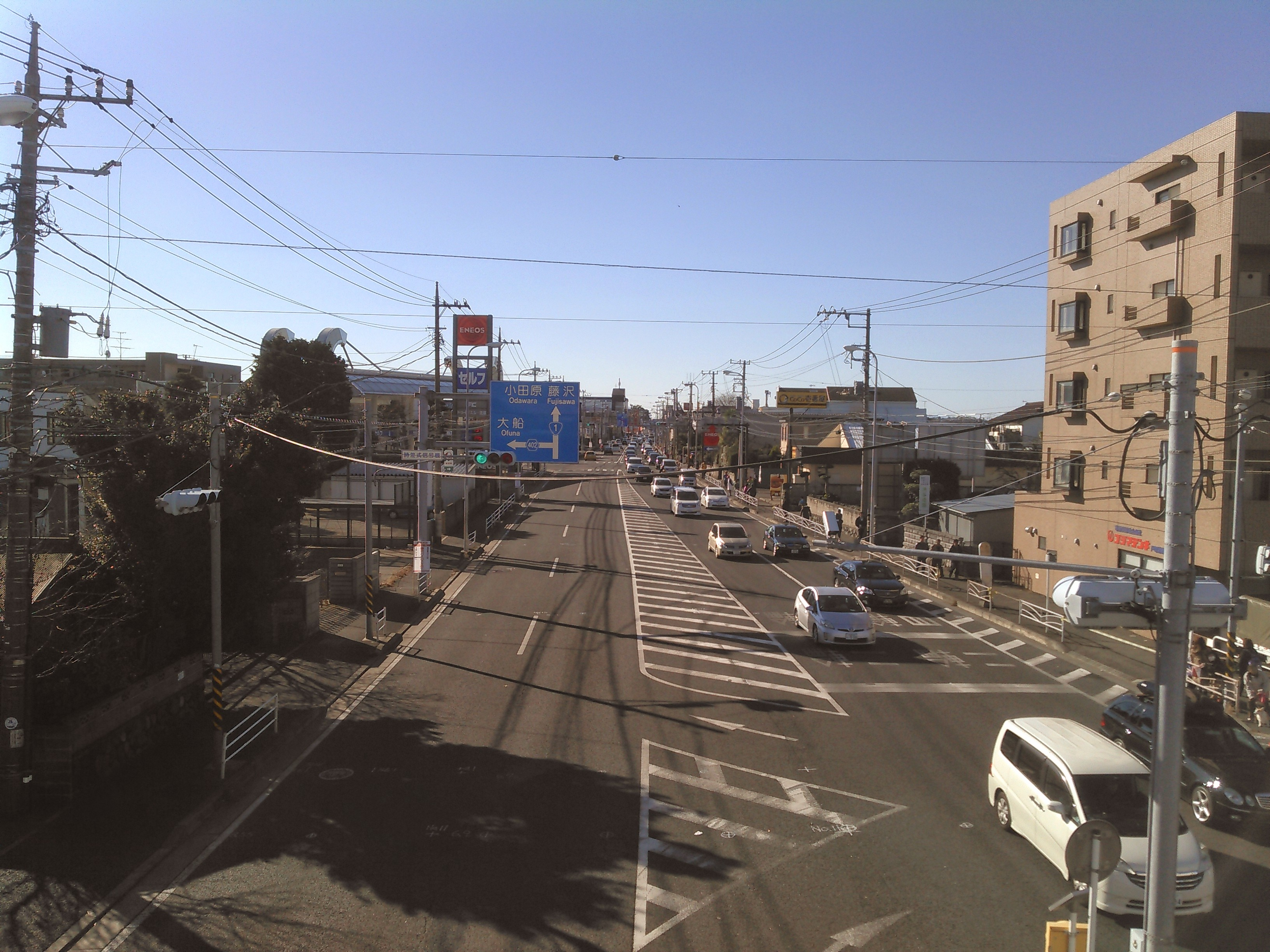 4 Chome Harajuku, Totsuka-ku, Yokohama-shi, Kanagawa-ken 245-0063, Japan